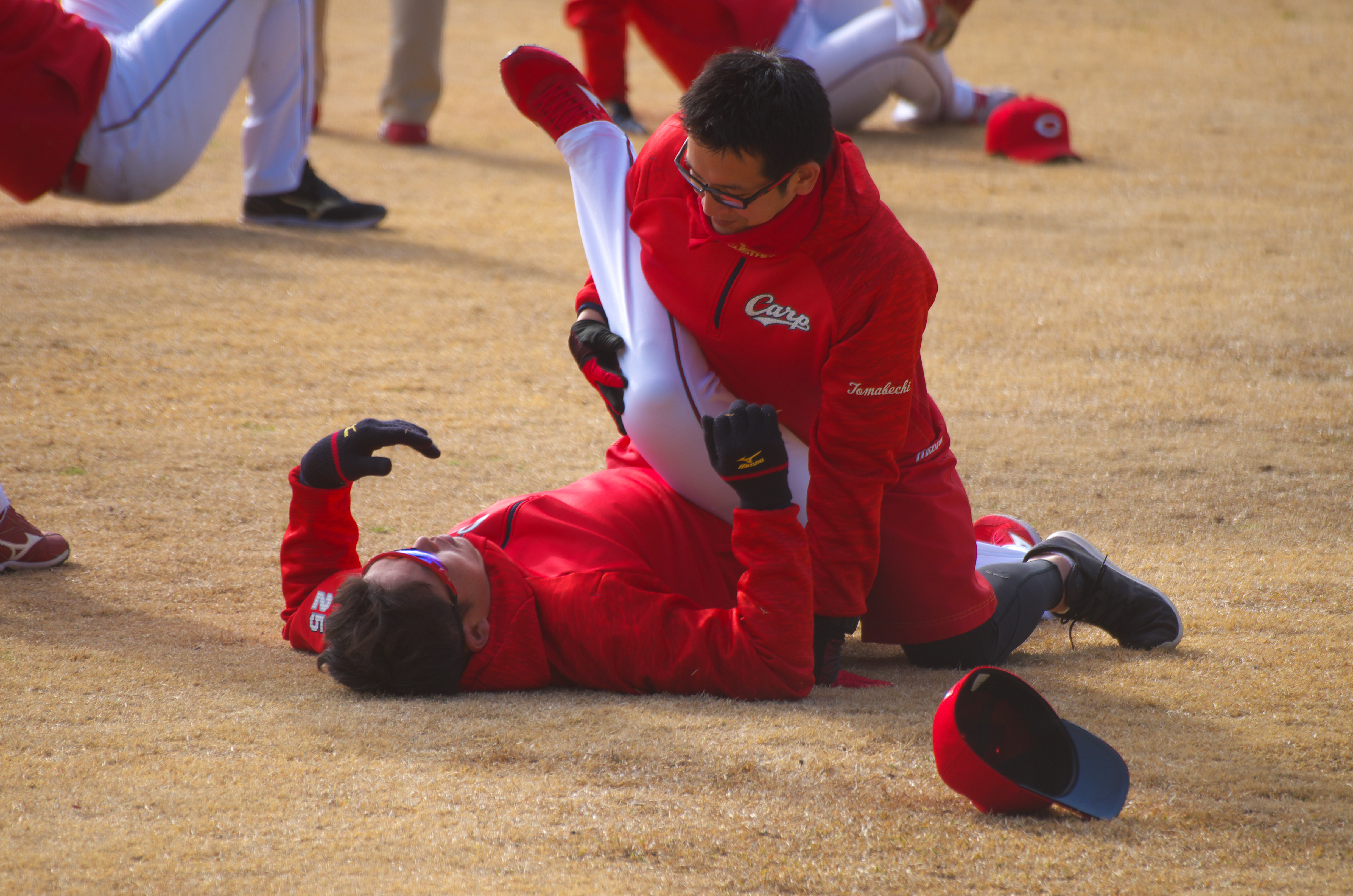 苫米地鉄人 2018年2月18日日南市天福球場にて 投稿者による撮影